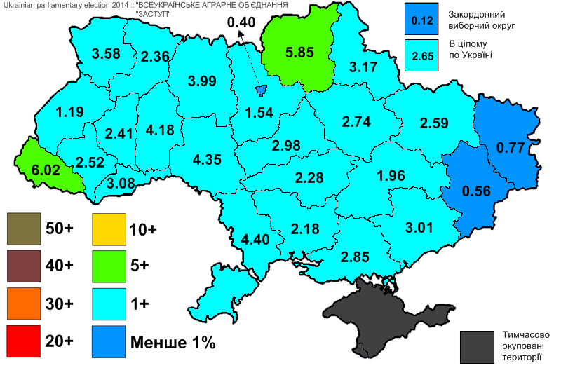 Результати виборів до Верховної Ради України, які відбулись 25 жовтня 2014 року. Інформація з офіційного сайту ЦВК. ПОЛІТИЧНА ПАРТІЯ "ВСЕУКРАЇНСЬКЕ АГРАРНЕ ОБ’ЄДНАННЯ "ЗАСТУП".